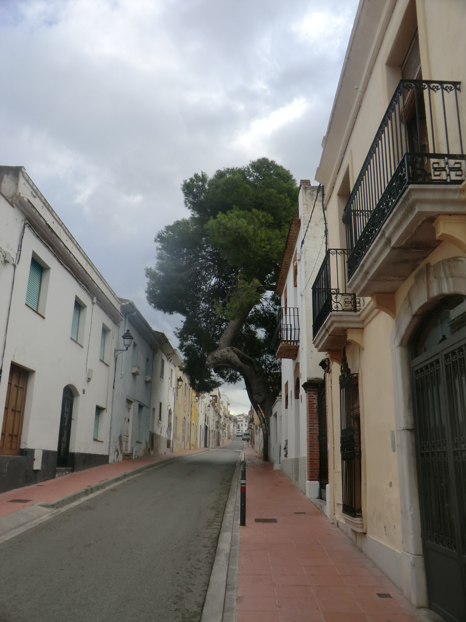 Pi del carrer del Pi de Sant Pere de Ribes